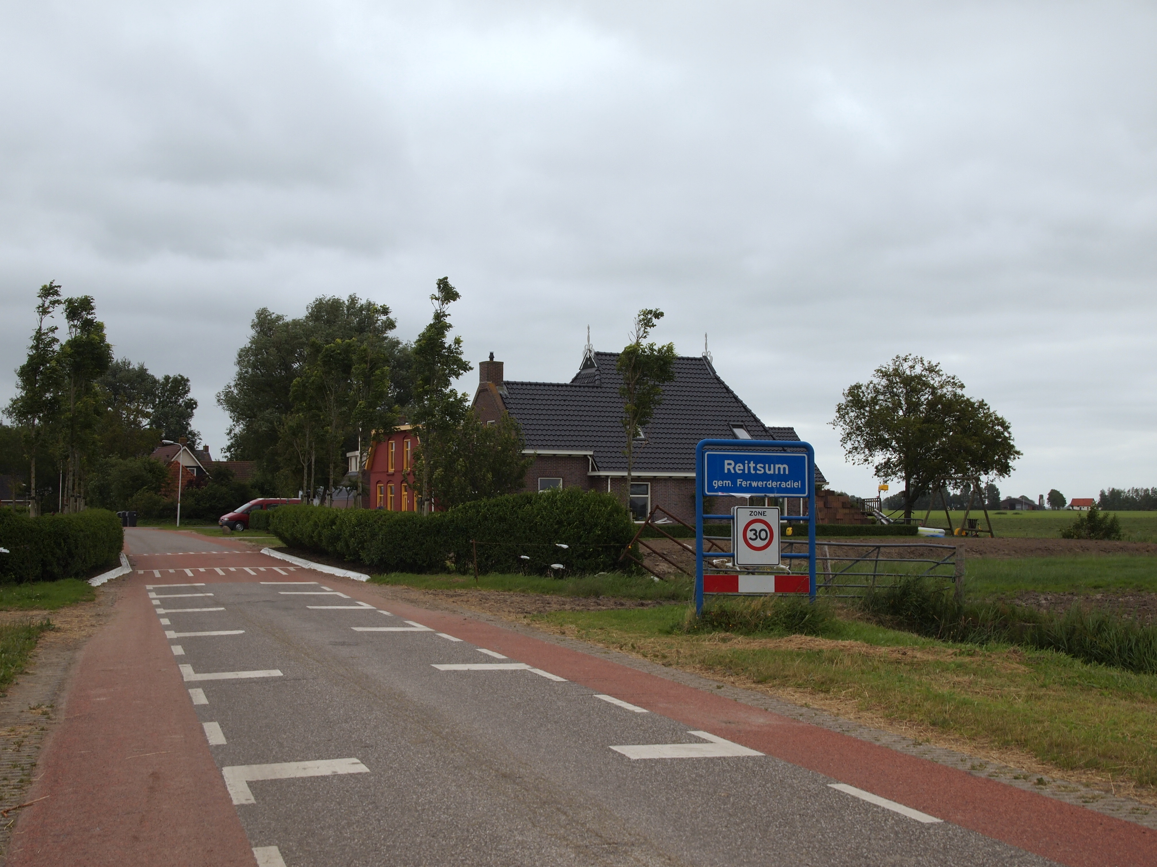 Het Friese dorp Reitsum